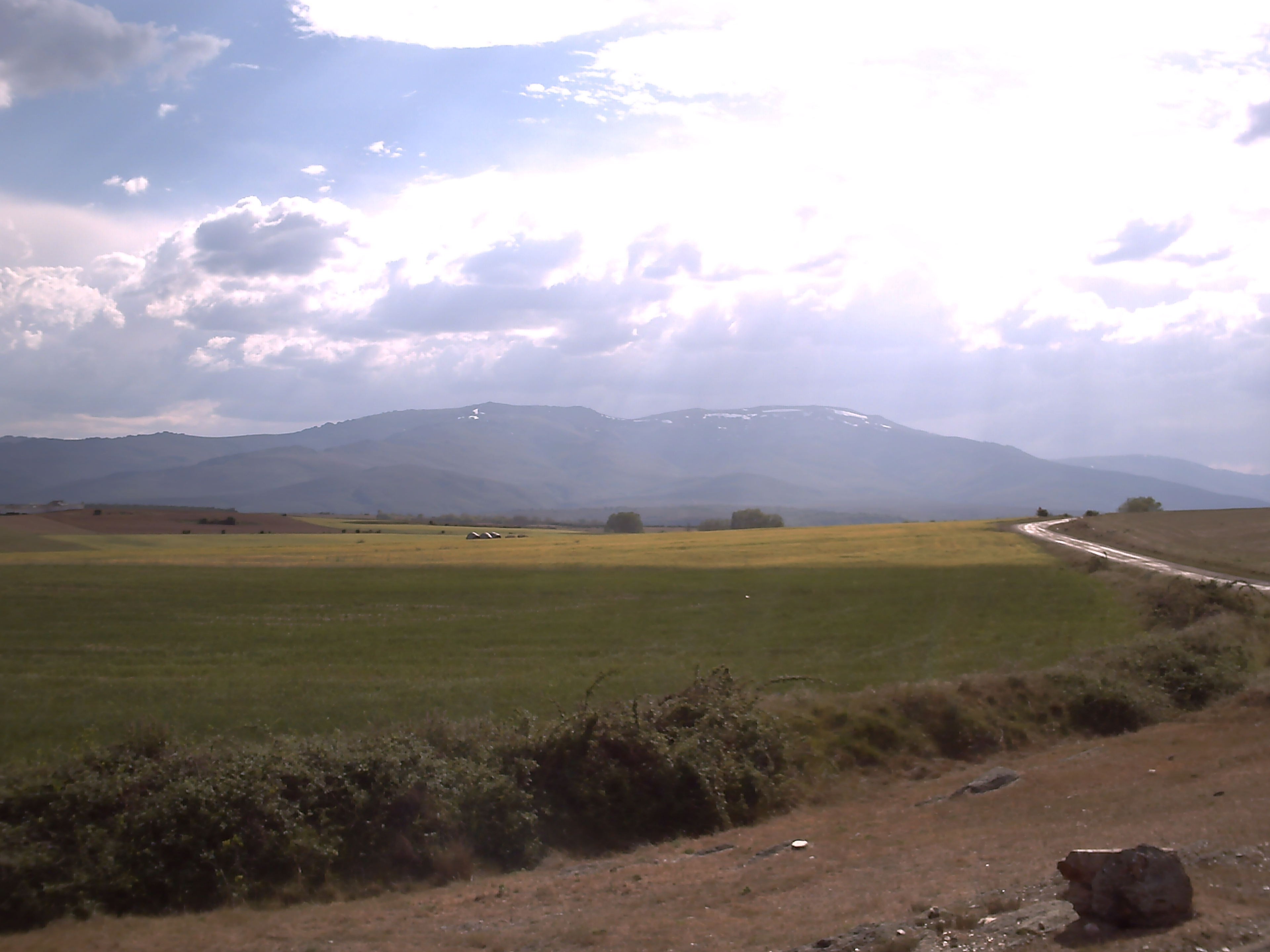 El Teleno